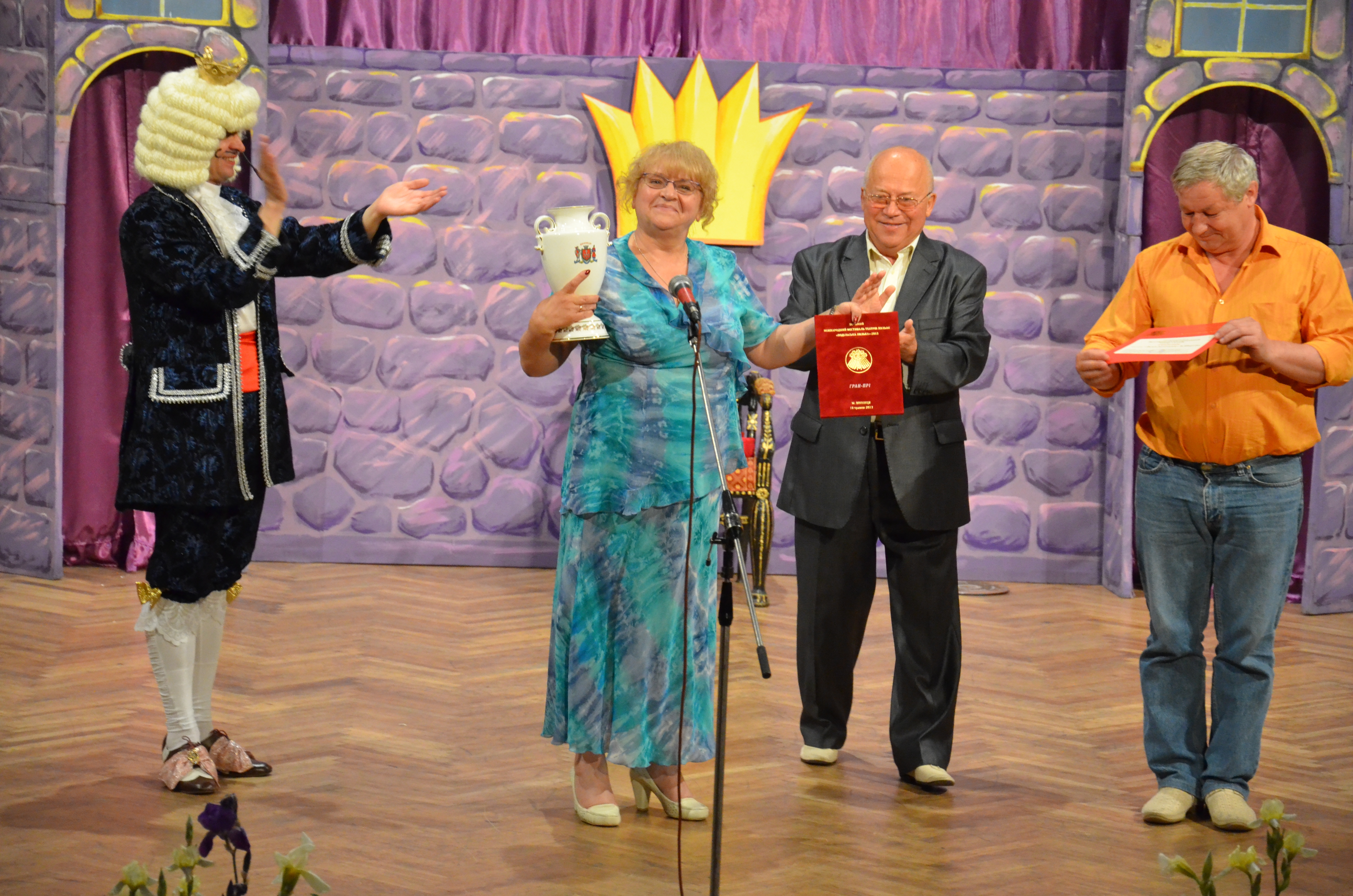 Белгородский государственный театр кукол на конкурсе на VIII Международном фестивале театров кукол «Подольская кукла» («Подiльска лялька»). Винница, 13–18 мая 2013 г.